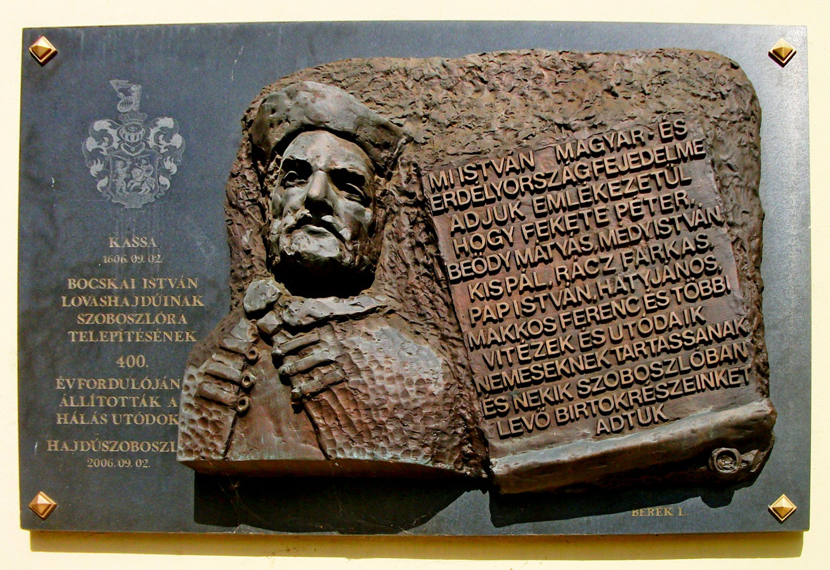 Az dombormű a református templom falán található, mely dr. Berek Lajos munkája. A domborművet 2006. szeptember 2-án avatták fel 700 lovashajdú Hajdúszoboszlóra telepítésének 400. évfordulójának alkalmából avatták fel. A dombormű gránitból és bronzból készült.